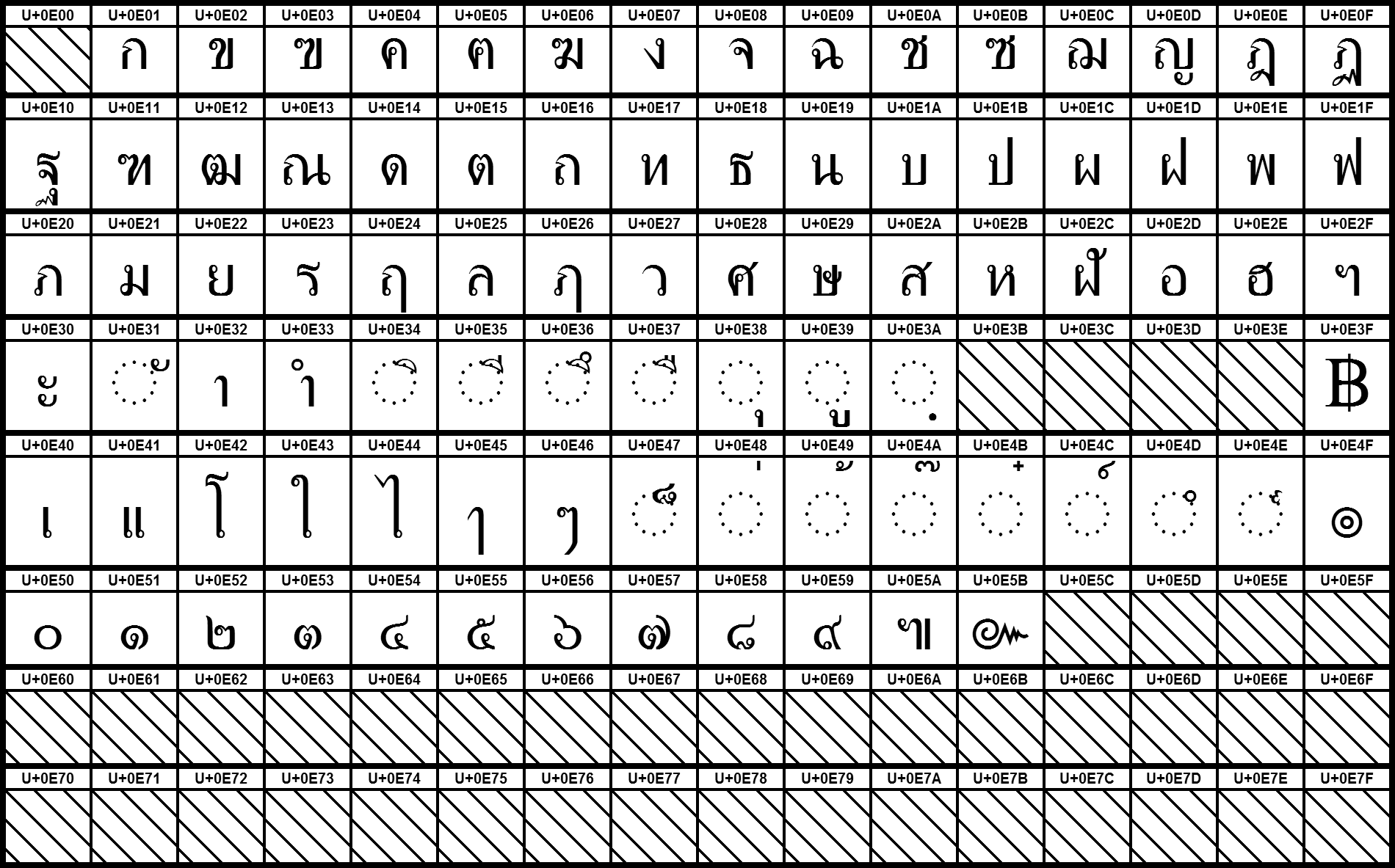 Grafiktafel für den Unicodeblock Thailändisch. Schraffierte Felder sind unbesetzte Codepoints.